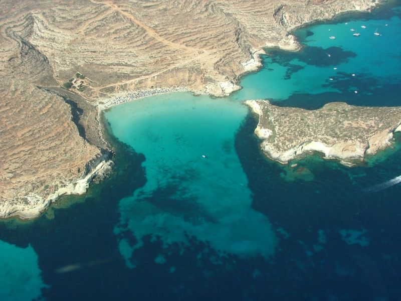 lampedusa_8